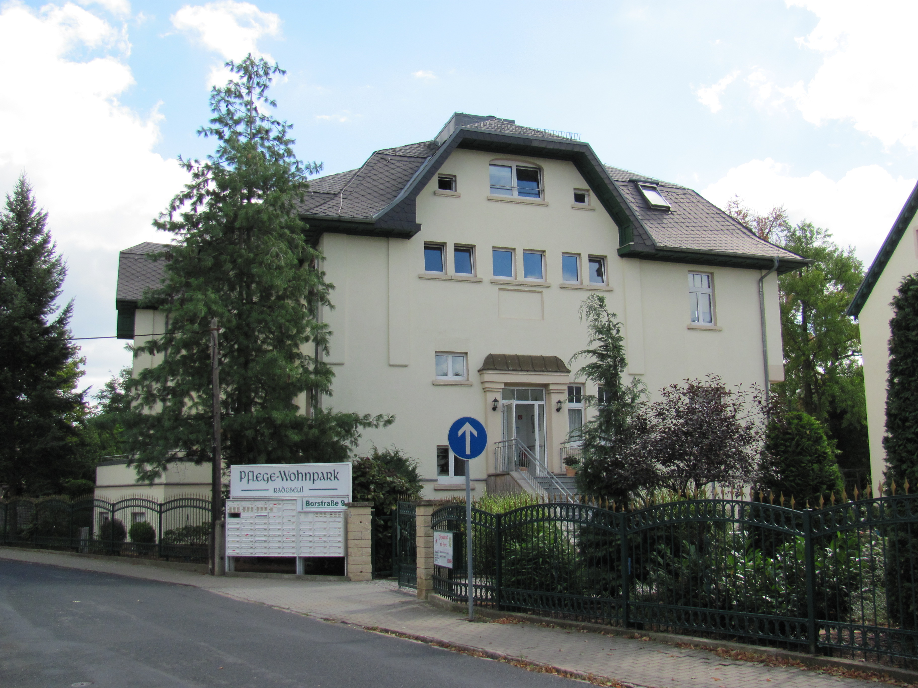 Radebeul Herderpark, von der Borstraße aus